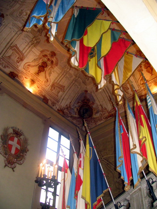 Asti , scalone principale del Palazzo del Comune. Bandiere dei partecipanti al Palio. Foto fatta da me faberh 2006